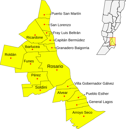 Gráfico que muestra los municipios incluidos en el Área del Gran Rosario.